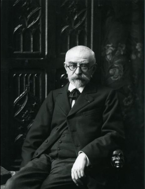 Huysmans photographié par Frédéric Boissonnas et André Taponier, vers 1900.